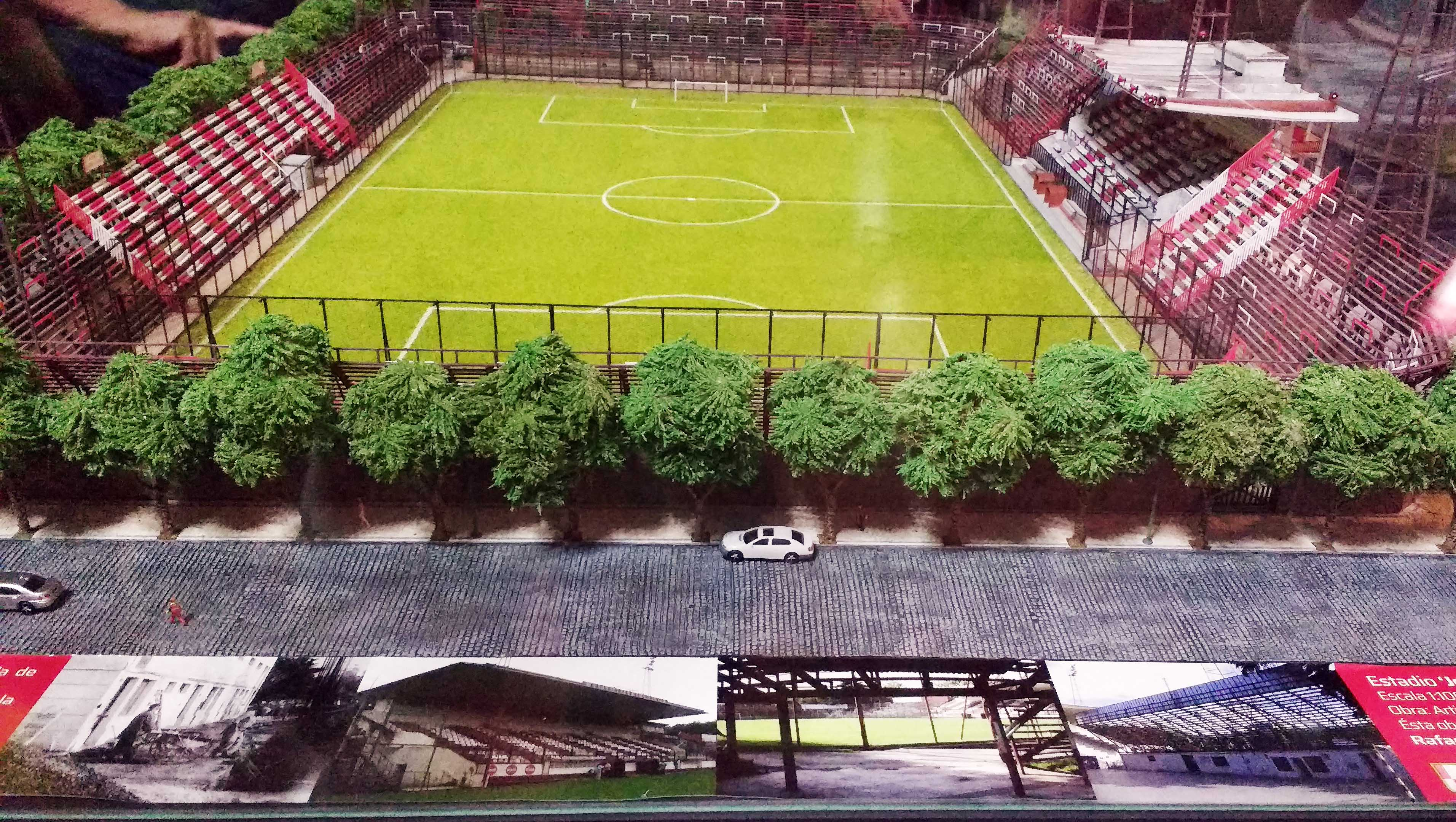 Maqueta realizada en escala 1/100 por el escenógrafo y vestuarista platense, Gianni Zacarías, del viejo Estadio Jorge Luis Hirschi, propiedad del Club Estudiantes de La Plata.